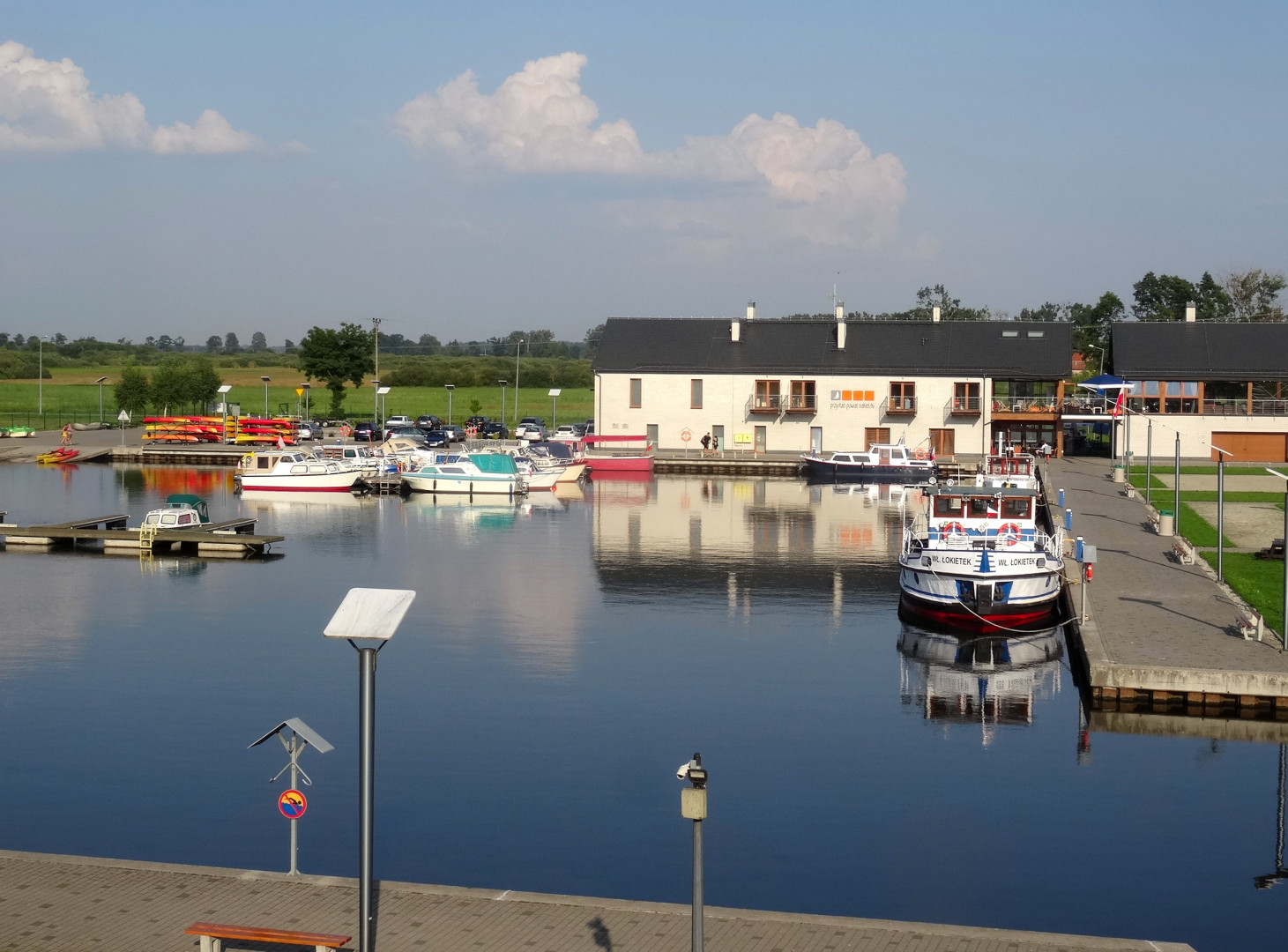 Przystań powiatu nakielskiego na Noteci w Nakle